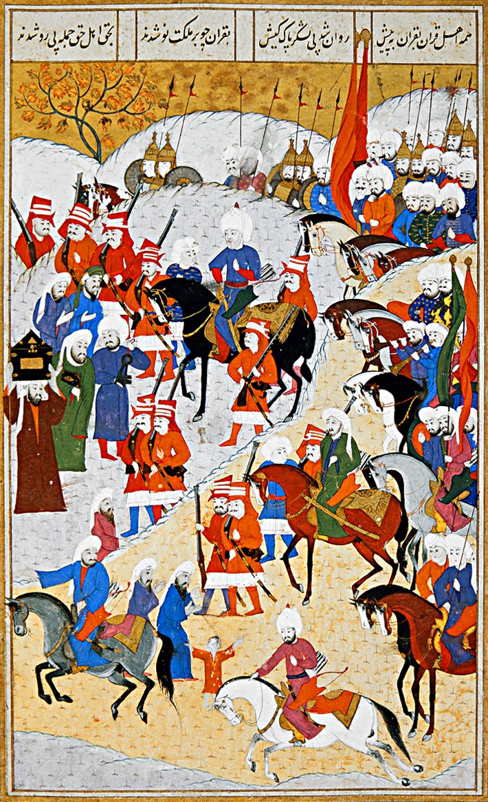 Cezayir Beylerbeyi Ramazan Paşa’yı tasvir eden bir minyatür